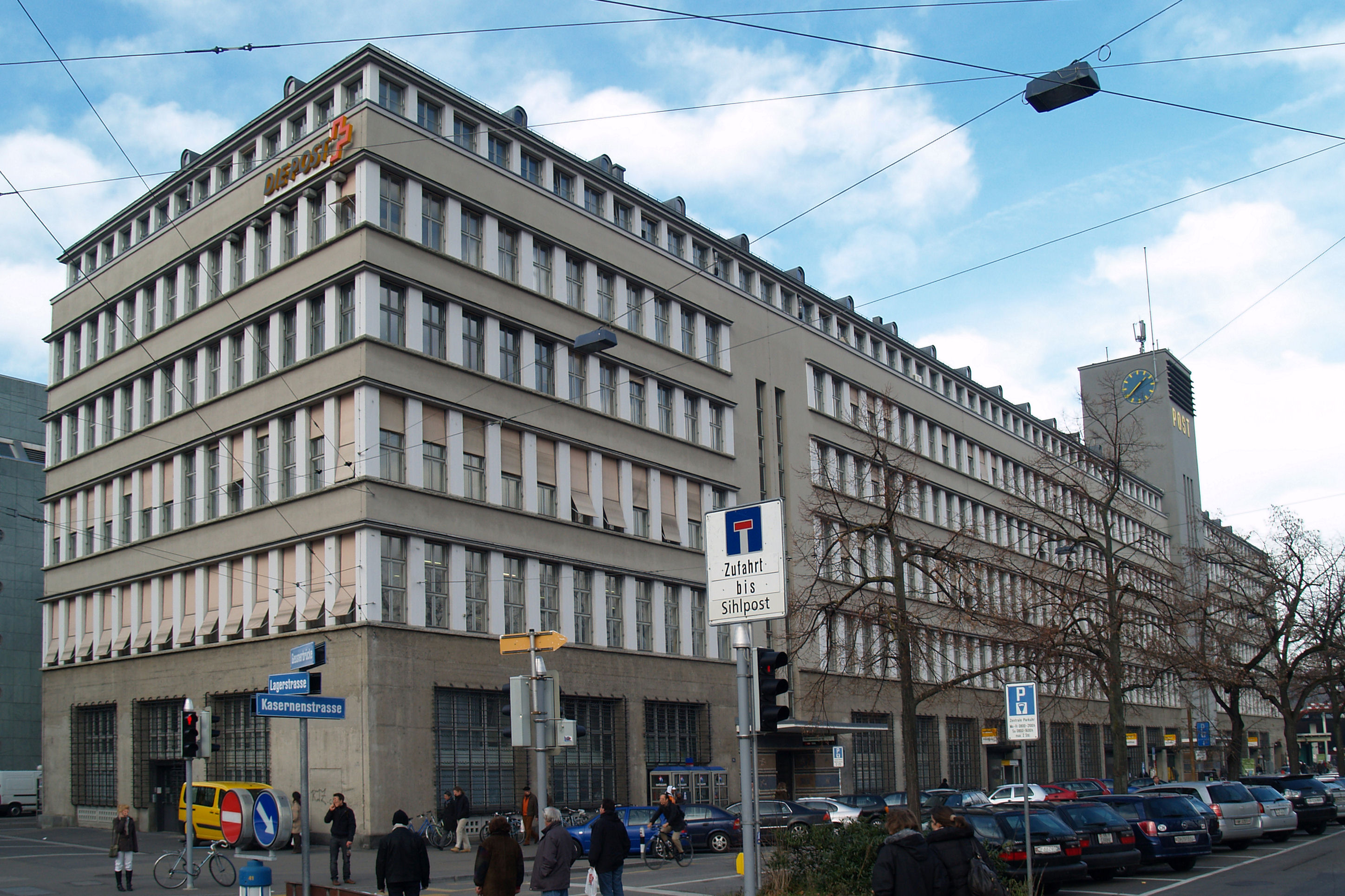 Das Gebäude Sihlpost der SBB. Kasernenstrasse 95-99 Zürich